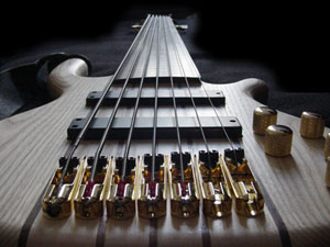 7-saitiger HeKe E-Bass "Goliath"